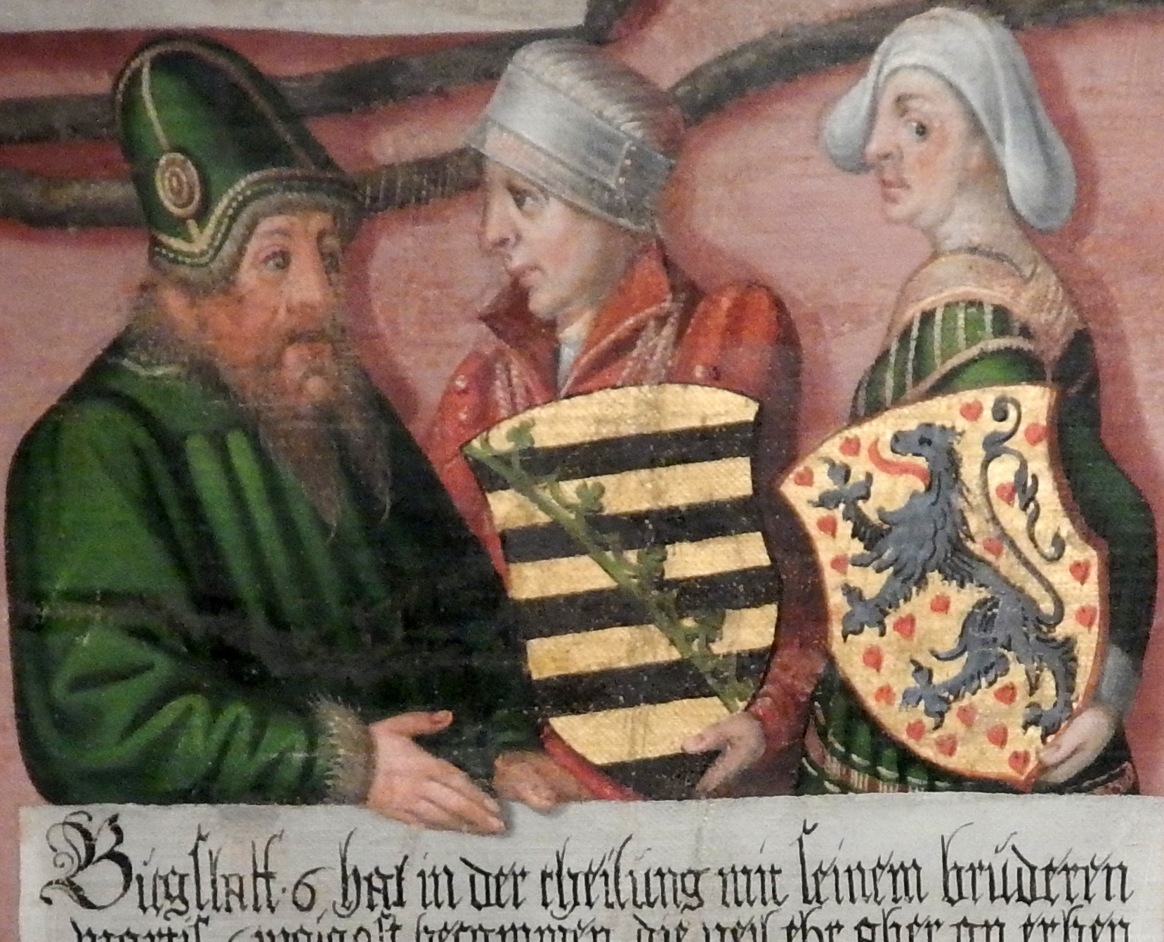 Bogislaw VI. von Pommern-Wolgast mit seinen Gemahlinnen Jutta von Sachsen-Lauenburg und Agnes von Braunschweig-Lüneburg.